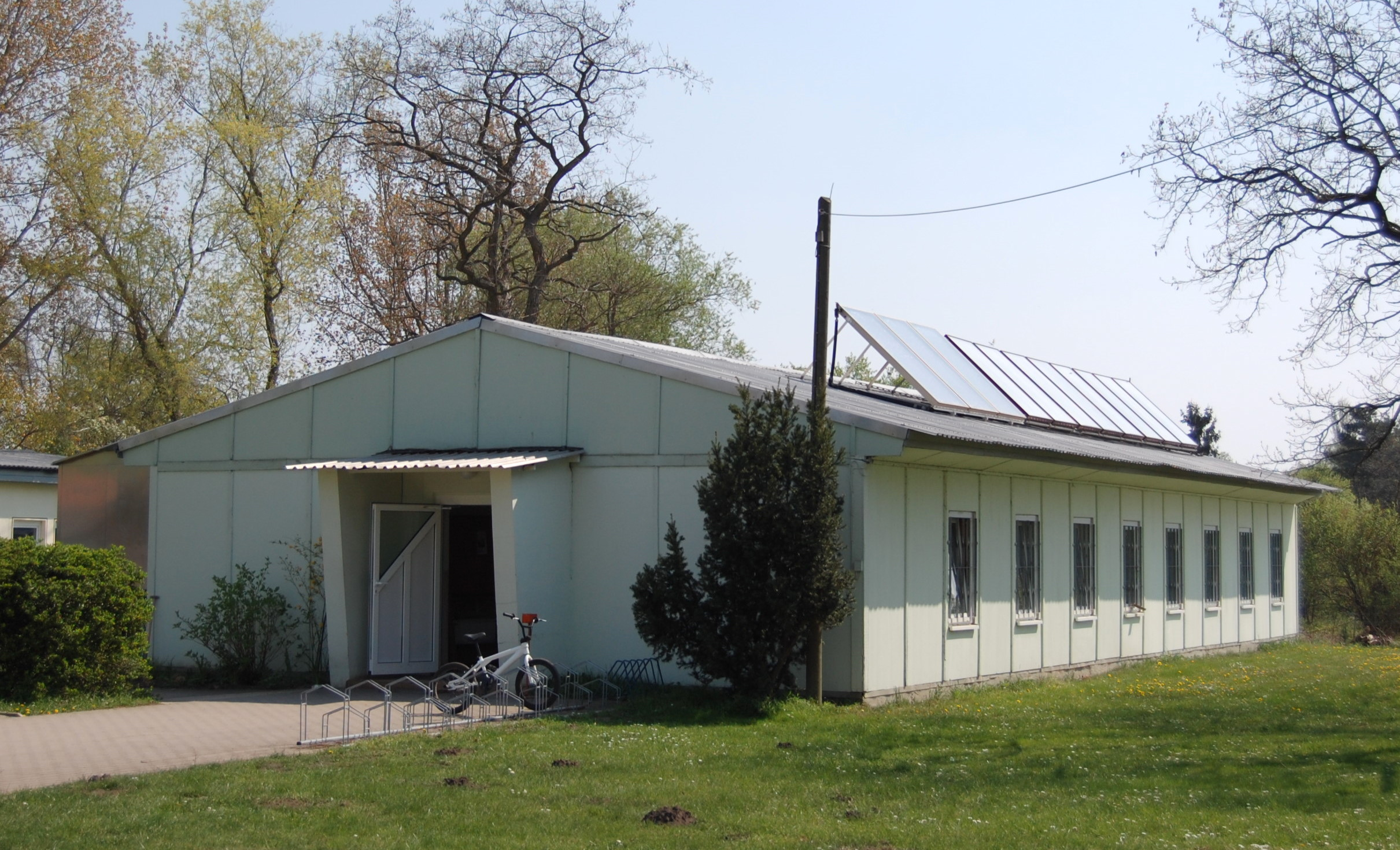 Sitz des WBF in Fermersleben